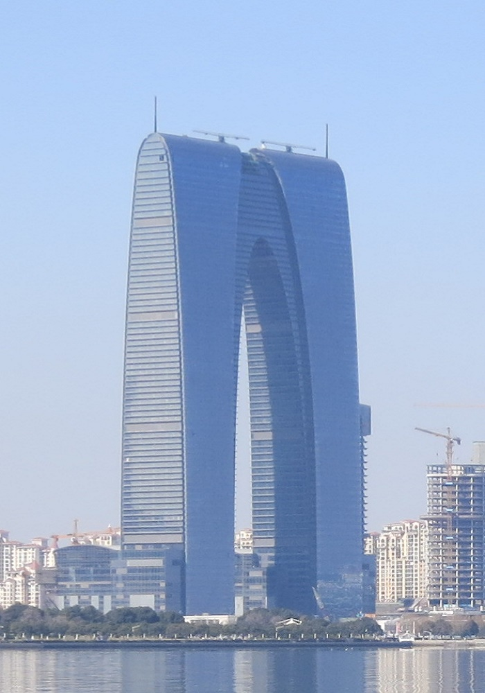 Gate of the Orient feb2015